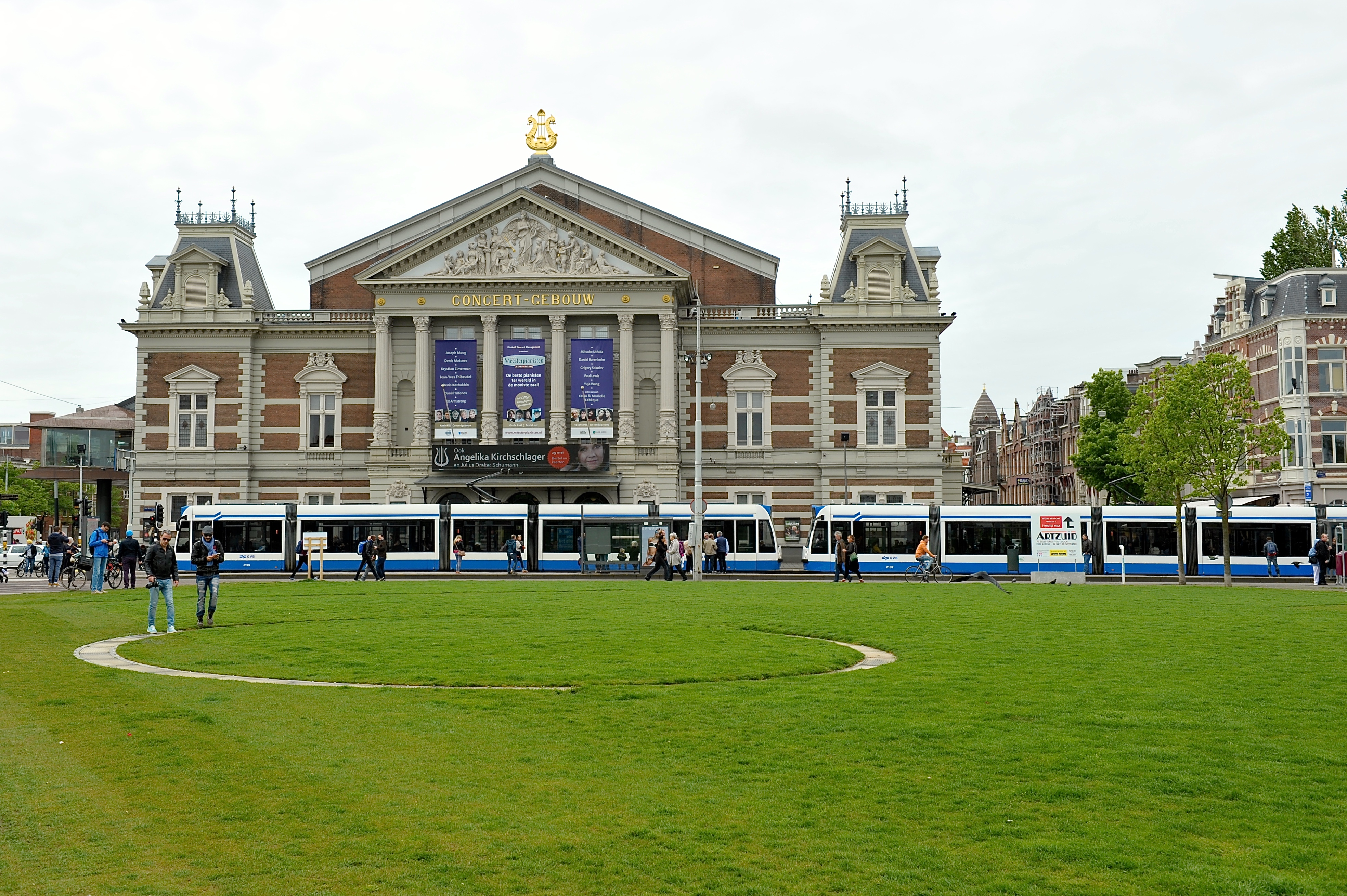 De bouw begon in 1883, oplevering vond plaats in 1888. De architect was Adolf Leonard van Gendt. Bron